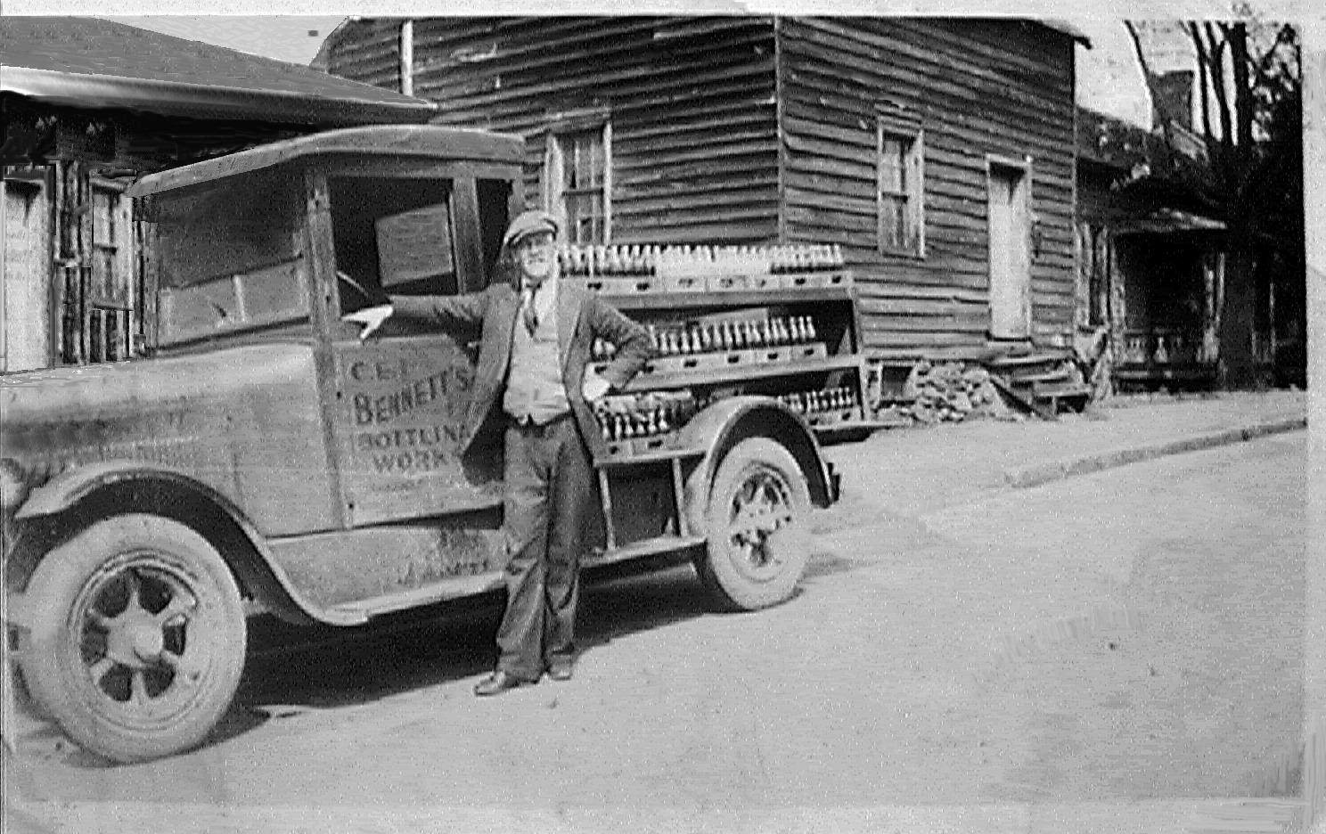 C. E. Bennett Bottling Works ; Winston - Salem, NC 1909 business ; Bennett's Cola